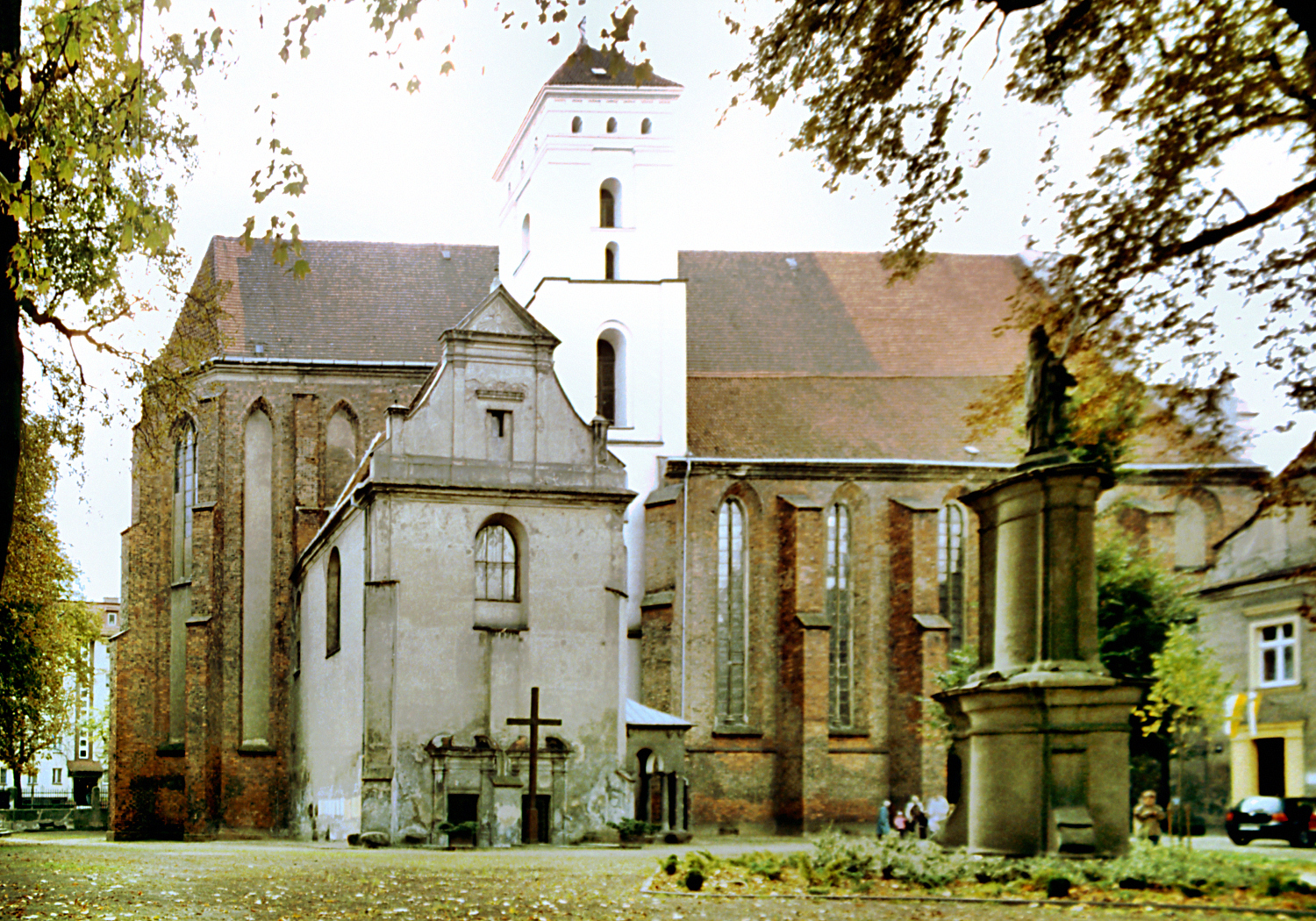 Poznań, kościół Bożego Ciała, widok od pn. (Poznań, Corpus Christi Church, view from nord).